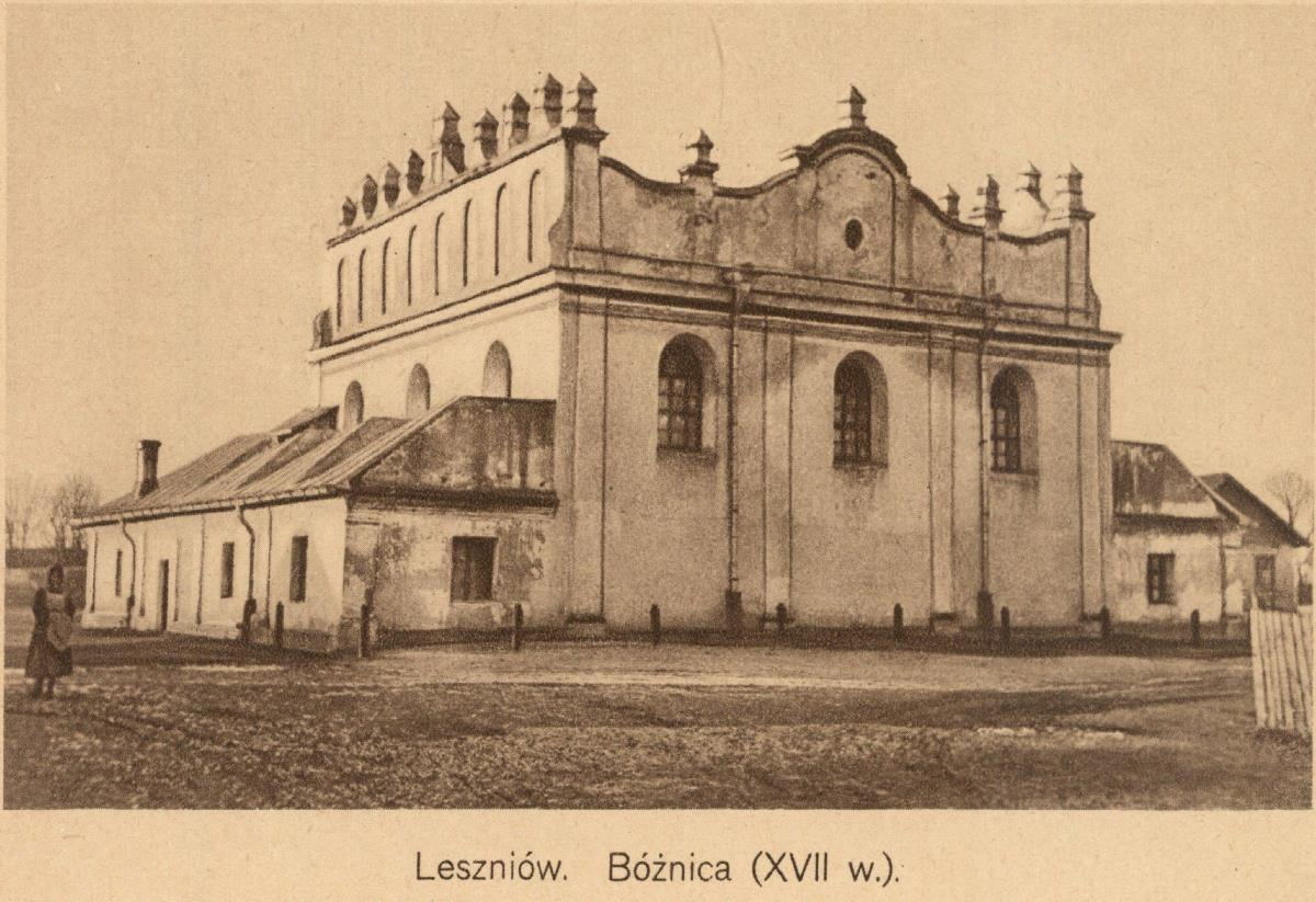 Синагога XVII ст. в Лешневі, була розібрана в кінці 1950-х - на початку 1960-х років.